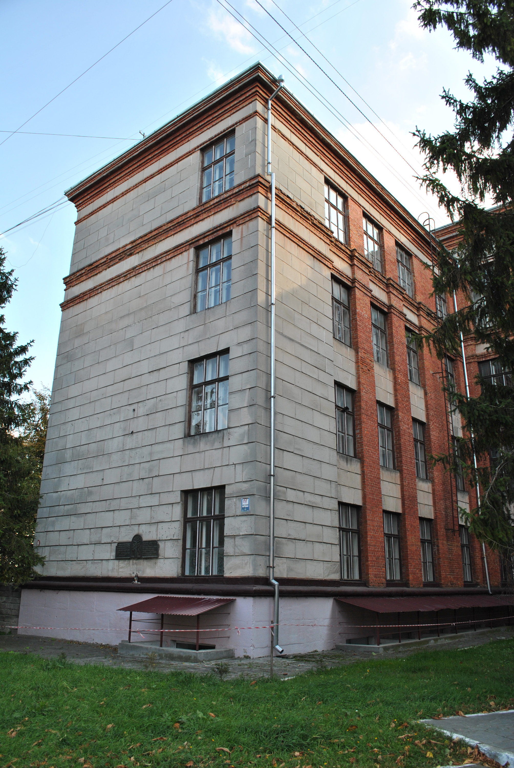 Пам'ятне місце, де нацисти розстріляли євреїв, Тернопіль, вул. Руська, 12, Морфологічний корпус.